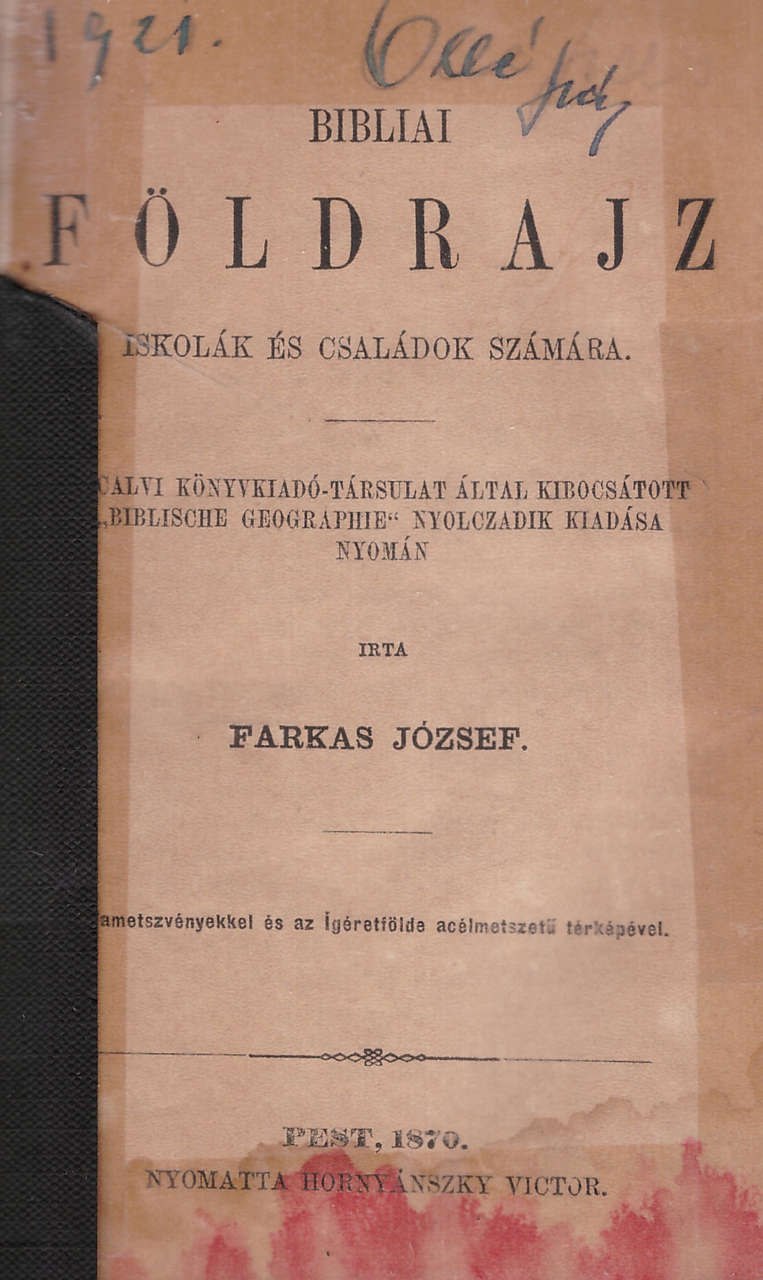 Farkas József (1833-1908): Bibliai földrajz iskolák és családok számára (1870)